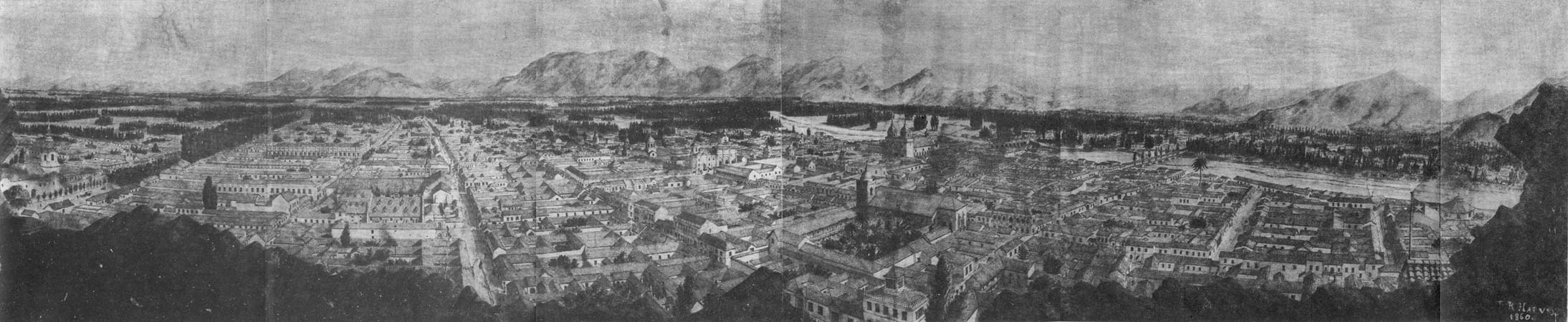 Vista panorámica de Santiago de Chile en 1860, desde el cerro Santa Lucía mirando hacia el poniente.